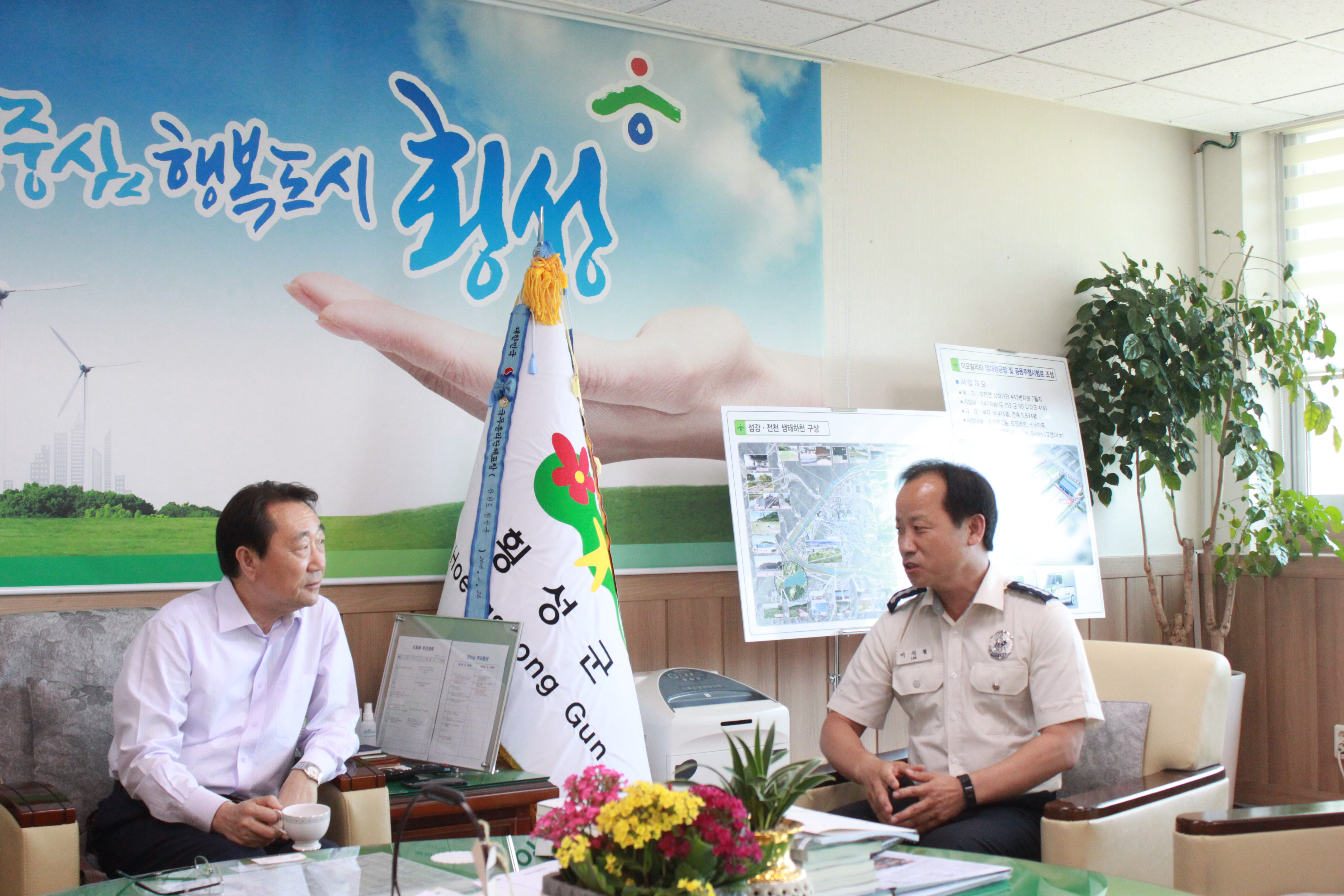 횡성군수 한규호, 횡성소방서장 이석철